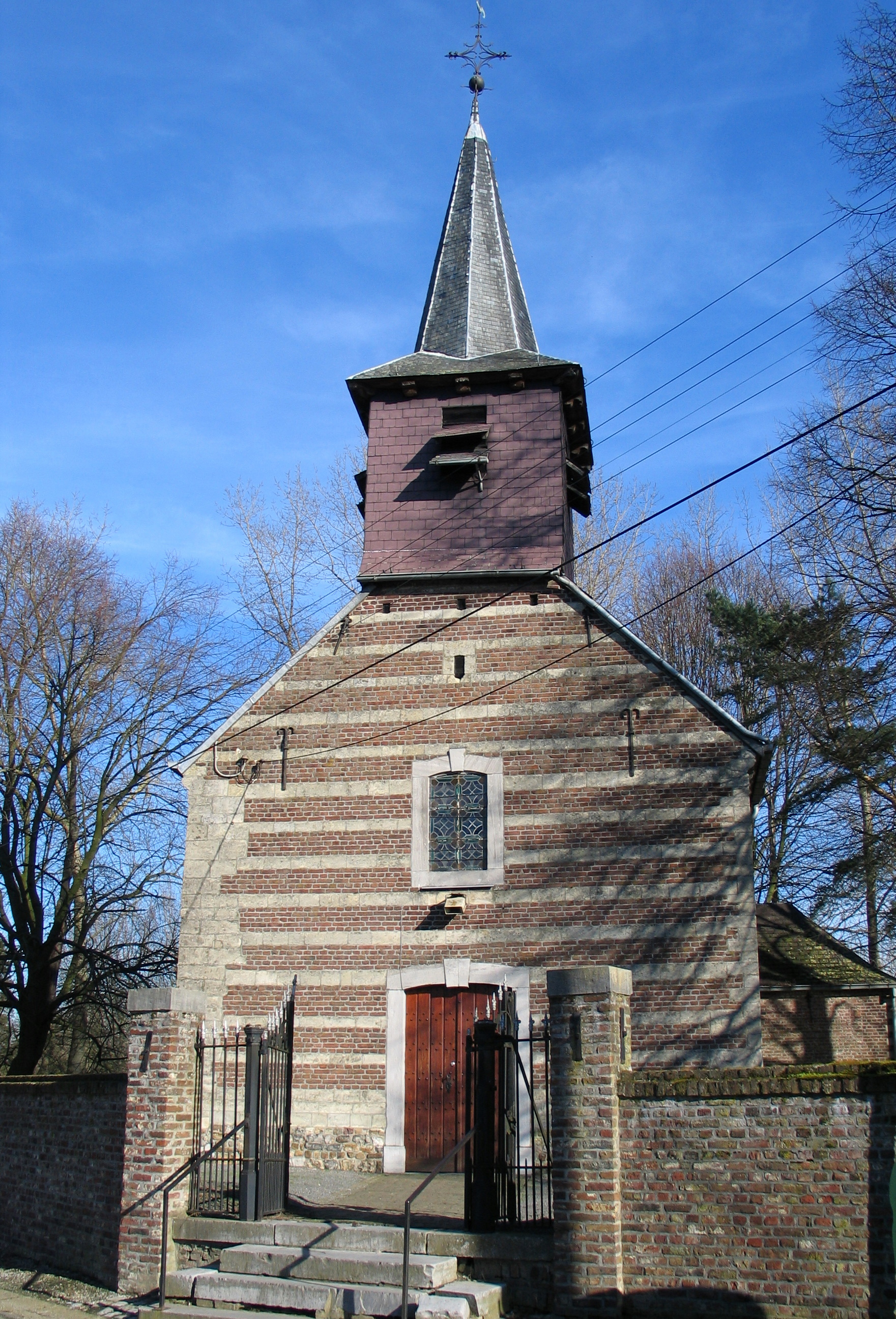 Sint-Pieterkerk in Haren, Borgloon, België